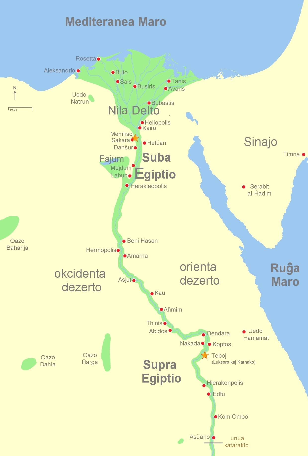 Mapo de antikva Egiptio (sude ĝis la urbo Asŭano)